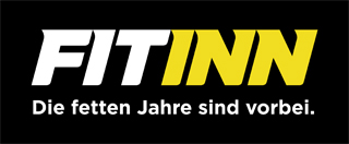 Logo der Fitinn Sportstudio GmbH